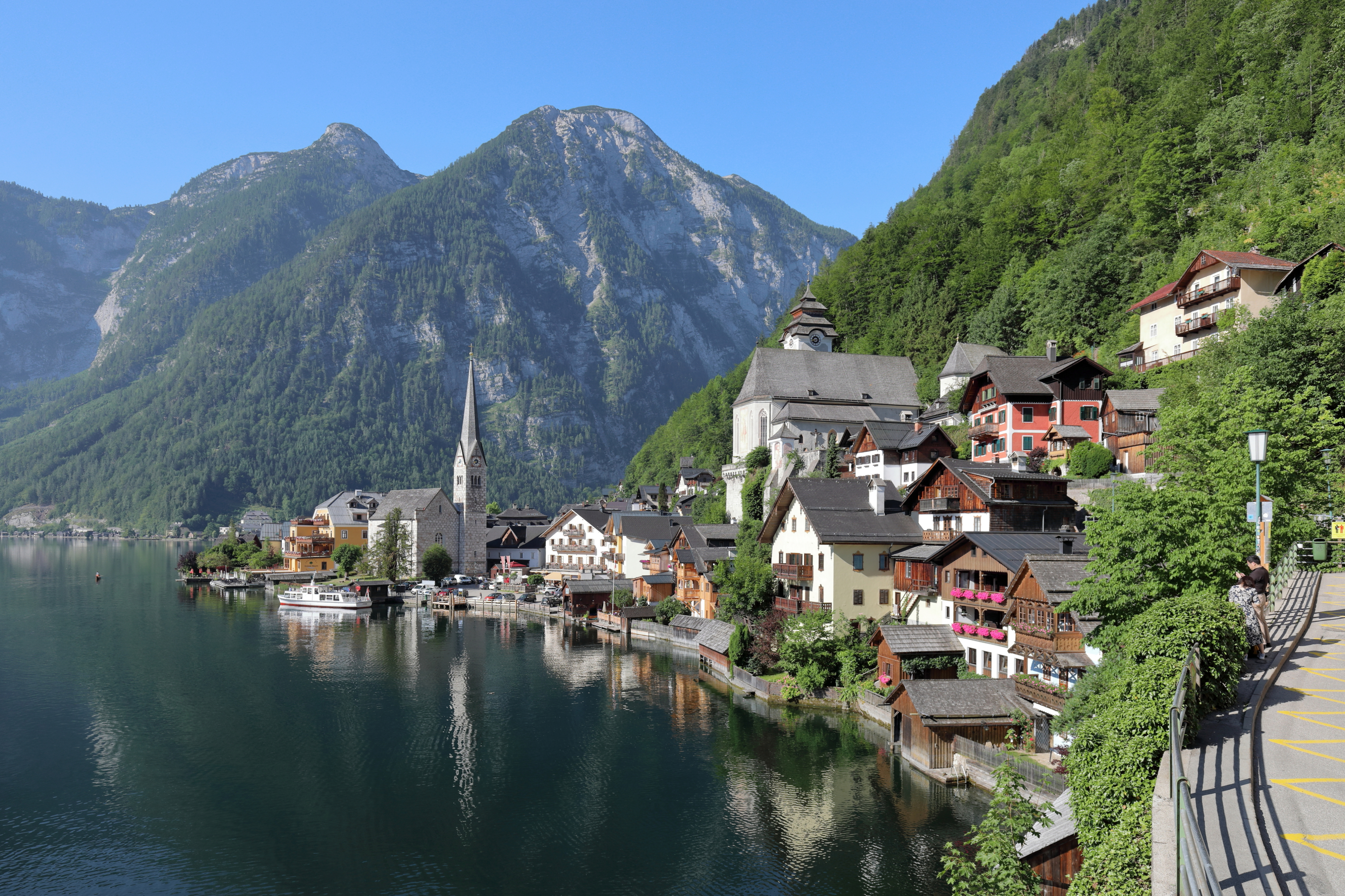 Nordansicht des Ortszentrums der oberösterreichischen Marktgemeinde Hallstatt und dahinter der 1934 m hohe Vordere Hirlatz. Die Perspektive ist identisch mit dieser Aufnahme um 1900: File:Hallstatt_um_1900.jpeg.